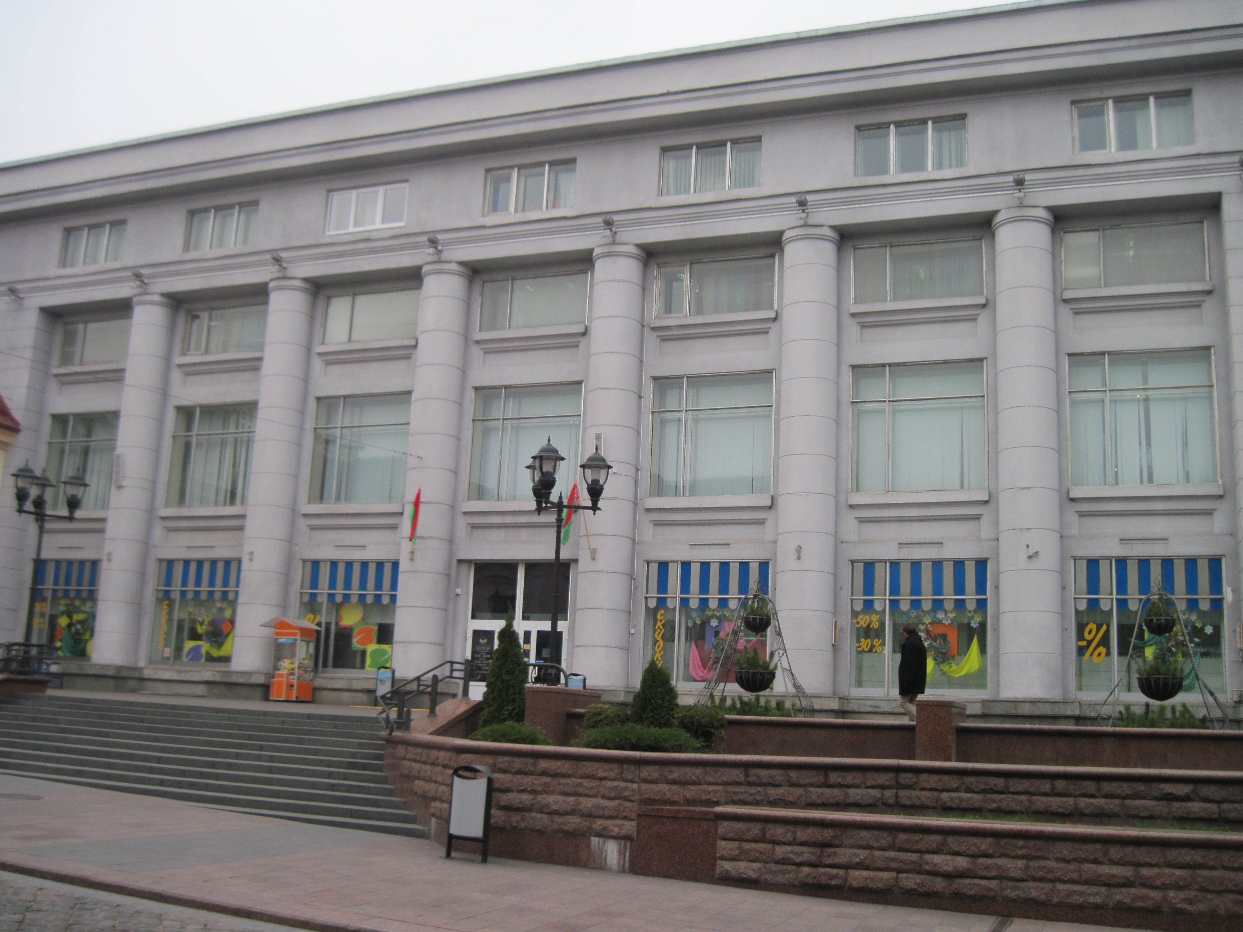 Беларуская (тарашкевіца): Будынак універмага, Гродна, Савецкая, 18